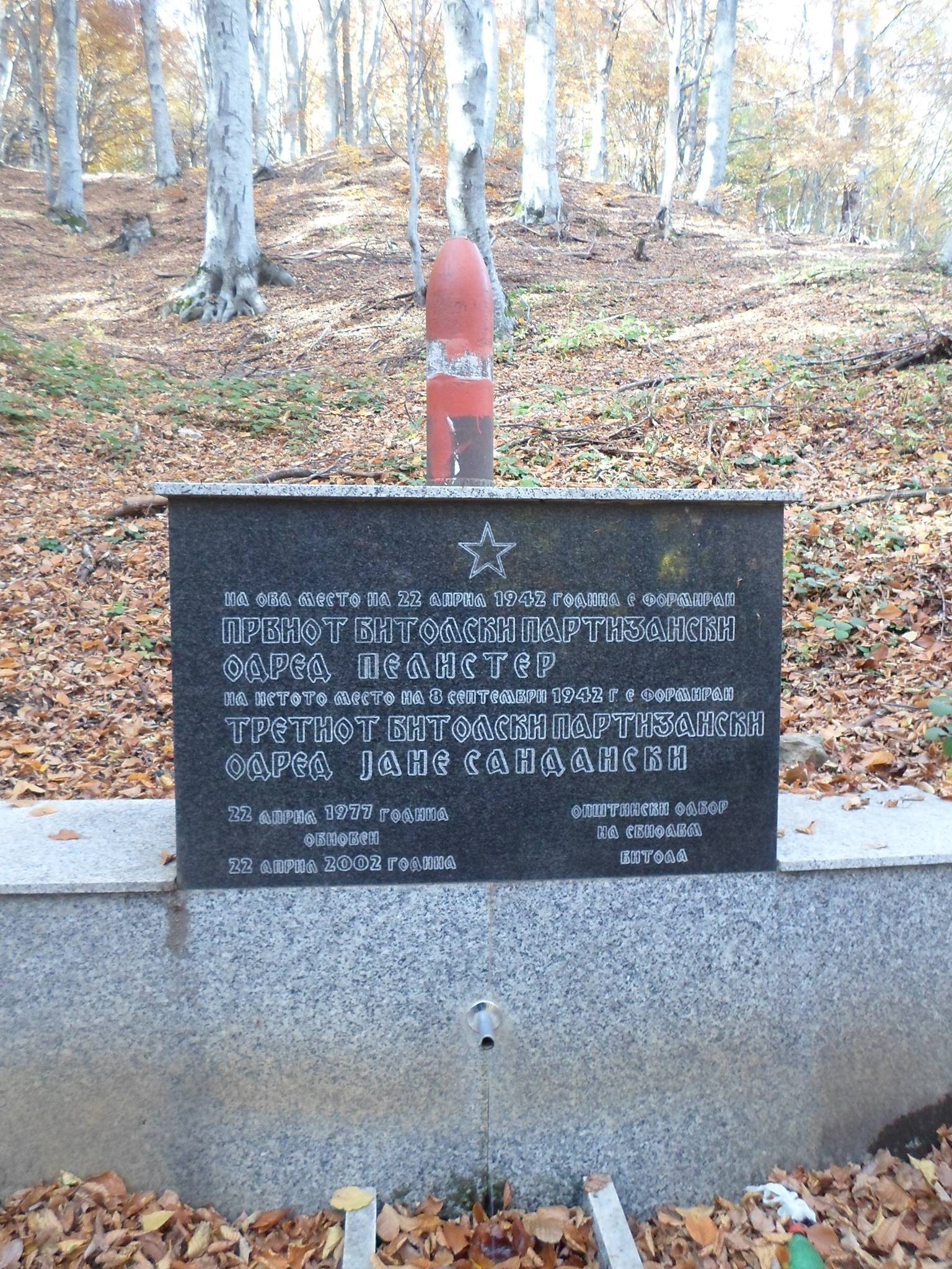 Спомен плоча на местото каде што е формиран Битолскиот партизански одред „Пелистер“